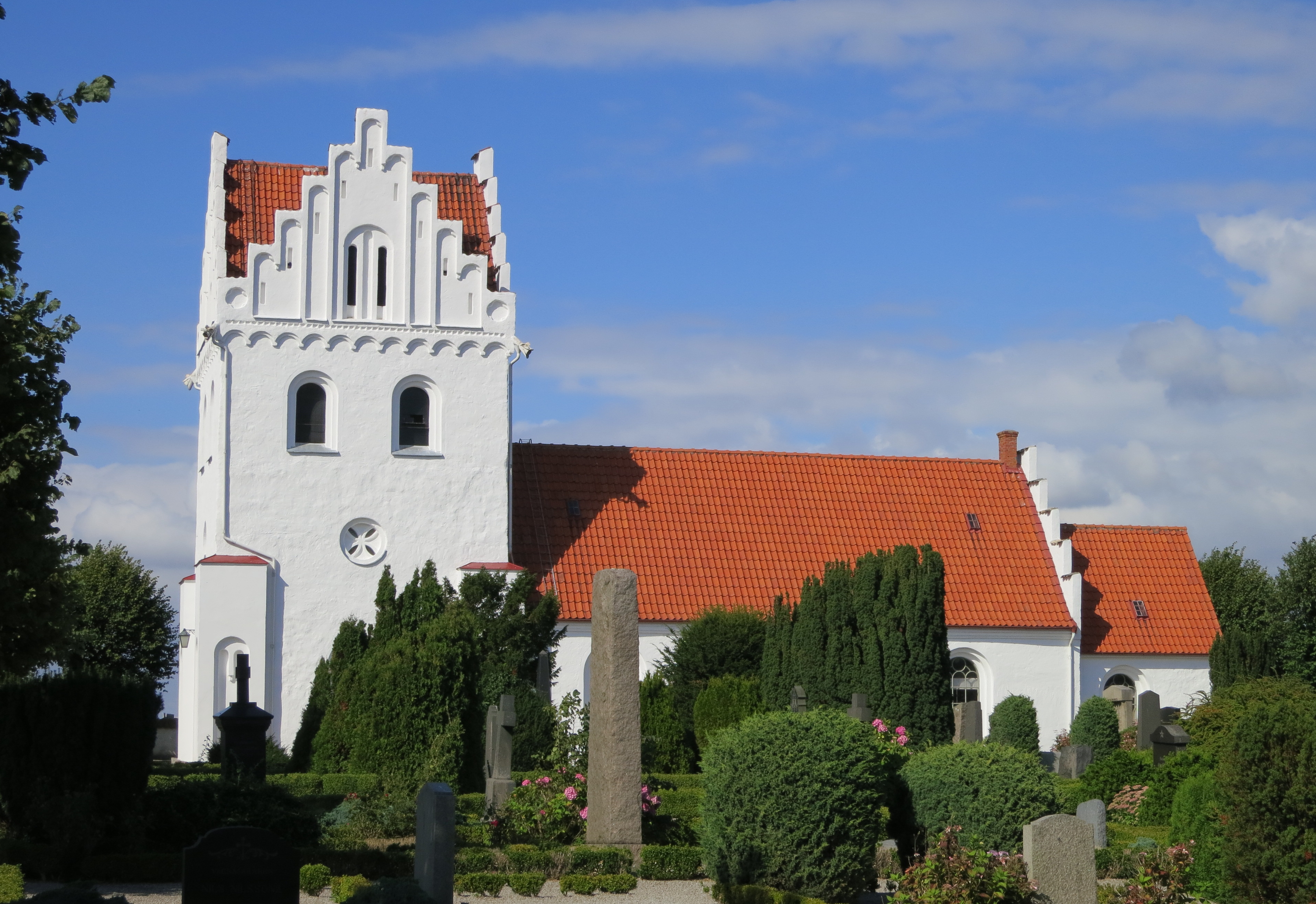 Skegrie kyrka i Trelleborgs kommun, Skåne